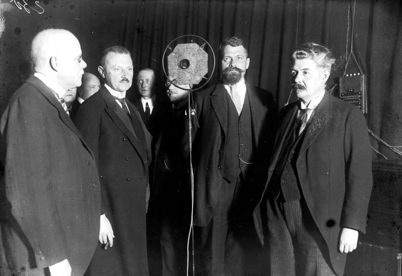 Der Reichskanzler des deutschen Reiches spricht erstmalig per Radio seine Weihnachtsproklamation. Der Reichskanzler am Aufnahmeapparat. Von links nach rechts: Reichskanzler Dr. Marx, Minister Scholz, Reichstagsabgeordneter Erkelenz und Abgeordneter Fischer.